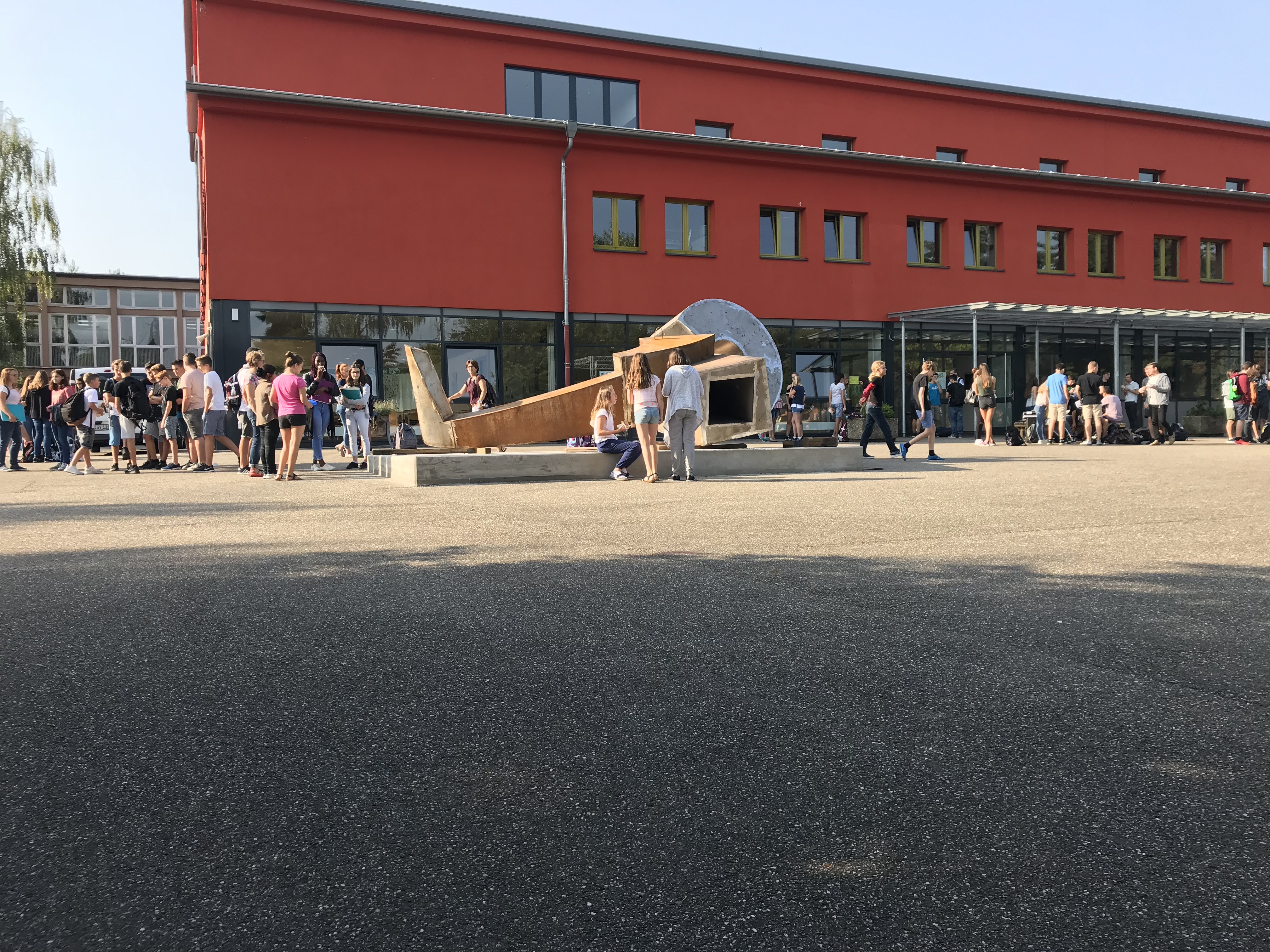 Das Gymnasium im Alfred Grosser Schulzentrum mit dem Kunstwerk "D617" oder "Der Schenkel der Nike" von Martin Schöneich.